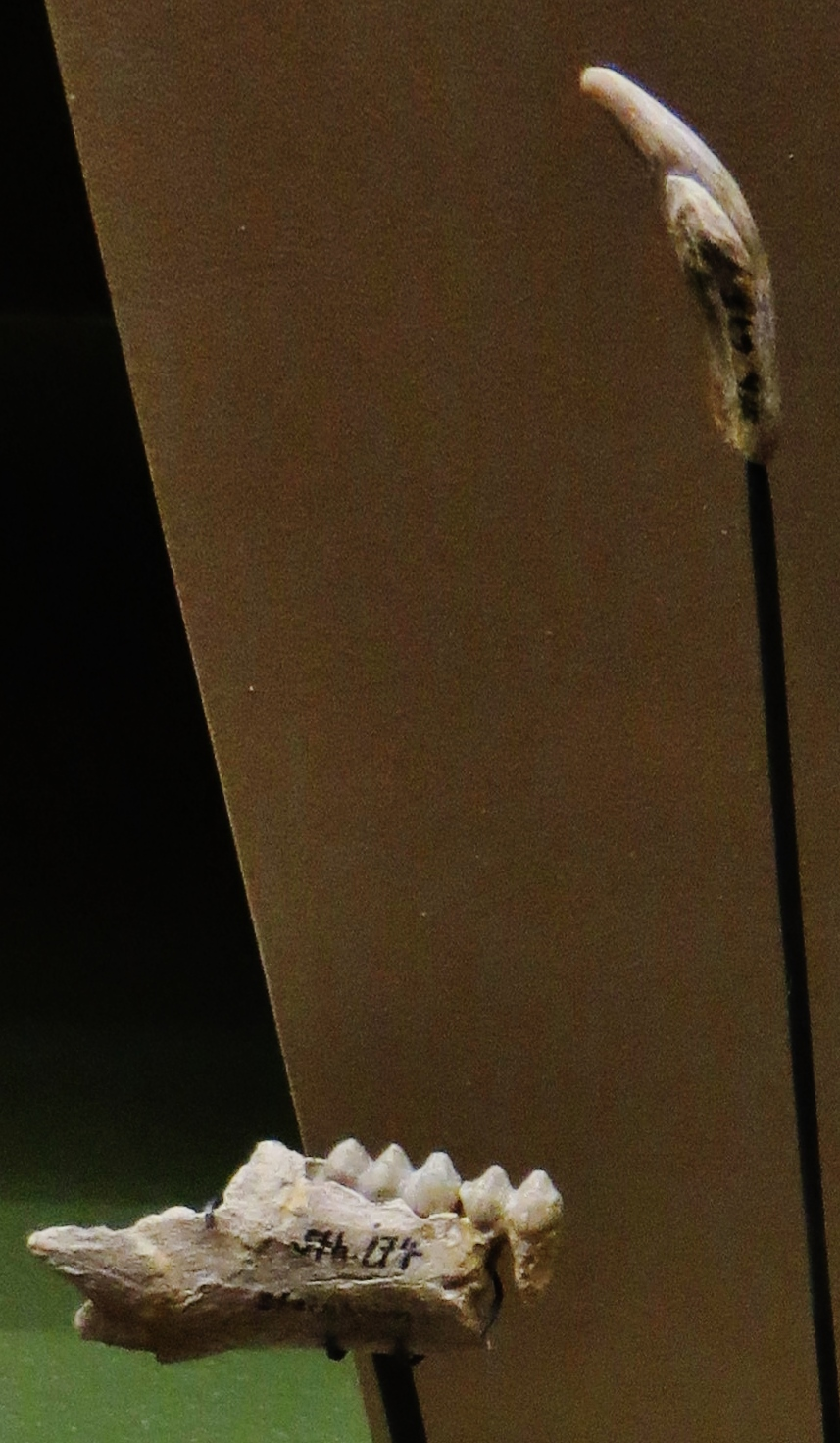 Fossil of Taucanamo - Took the picture at Natural History Museum, Basel